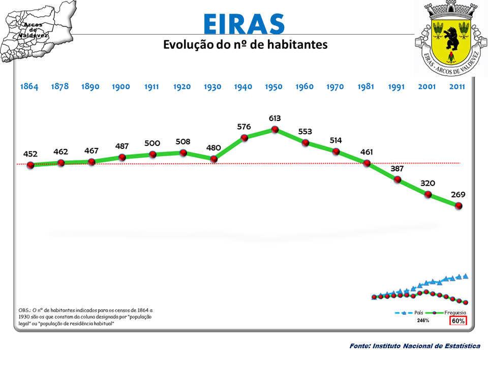 Censos 1864/2011